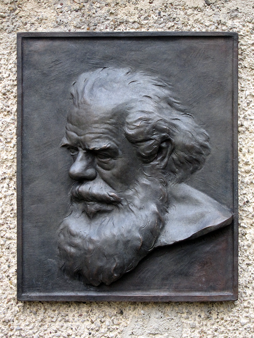 Halbrelief von Herman Greulich an seinem ehemaligen Wohnhaus an der Klusstrasse 28 in Zürich-Hirslanden